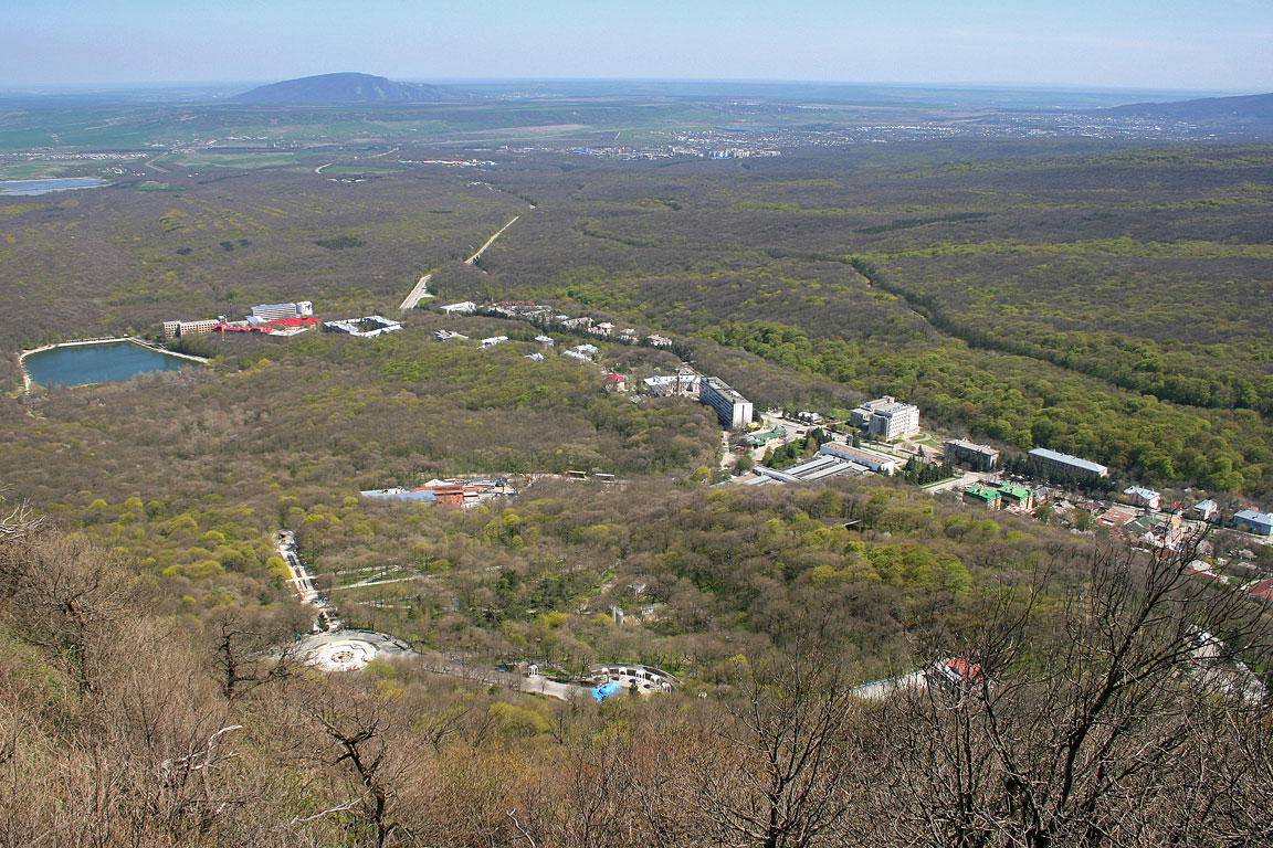 Железноводск. Вид с г. Железная